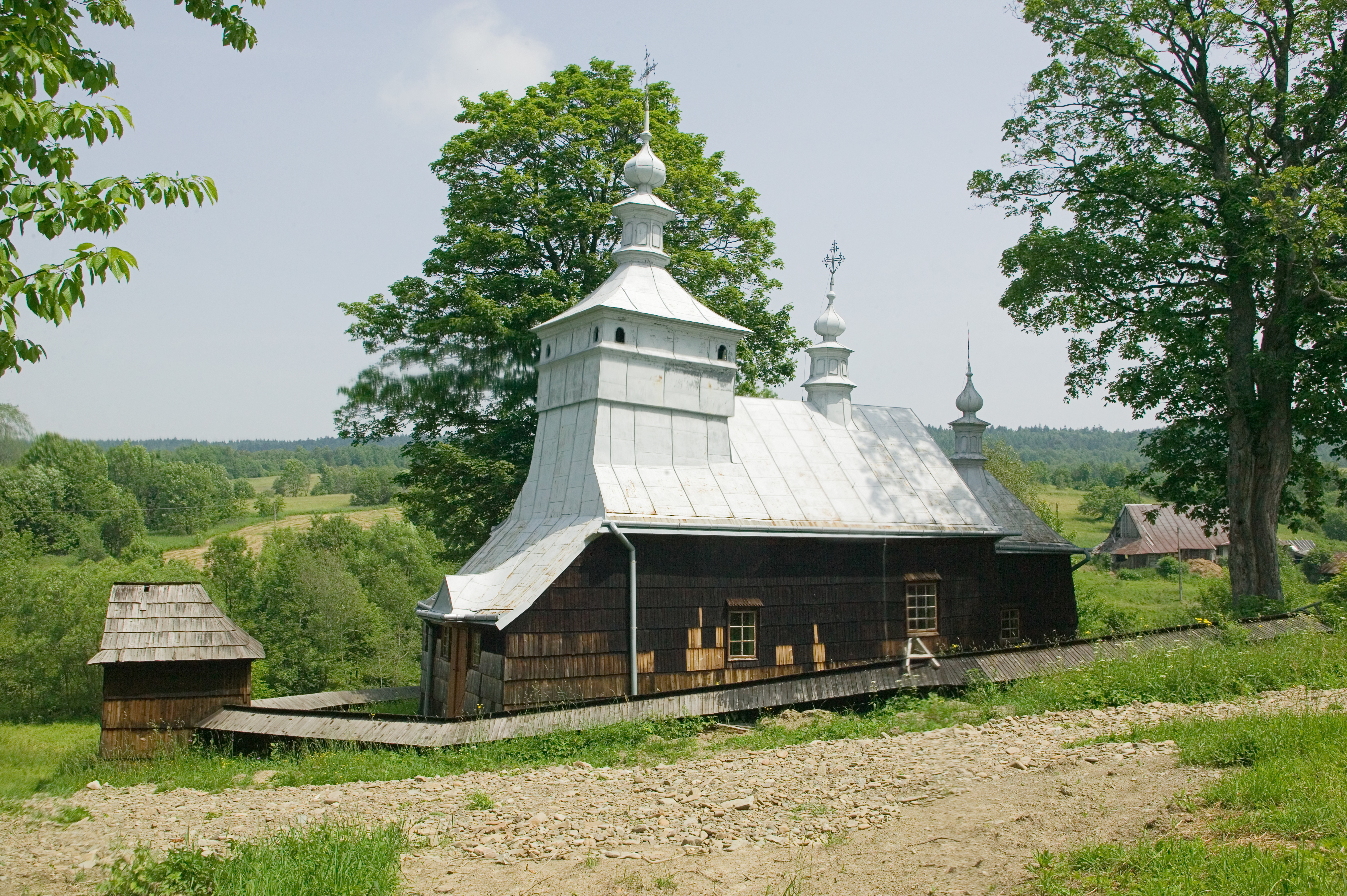 Przysłup, Cerkiew greckokatolicka p.w św. Michała Archanioła (zabytek nr rejestr. A-288)